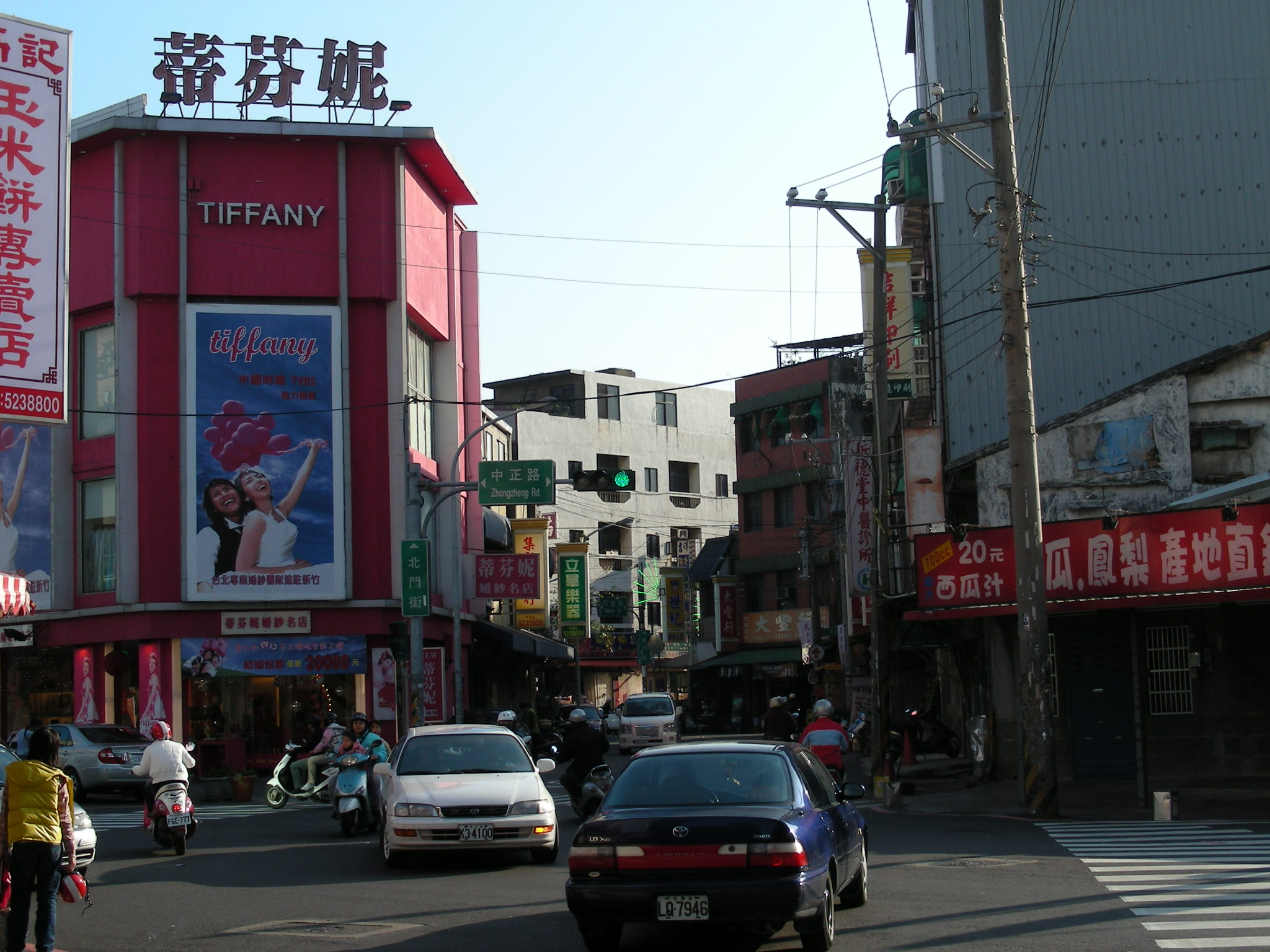 "Bei Men" Street in Hsinchu City, Taiwan